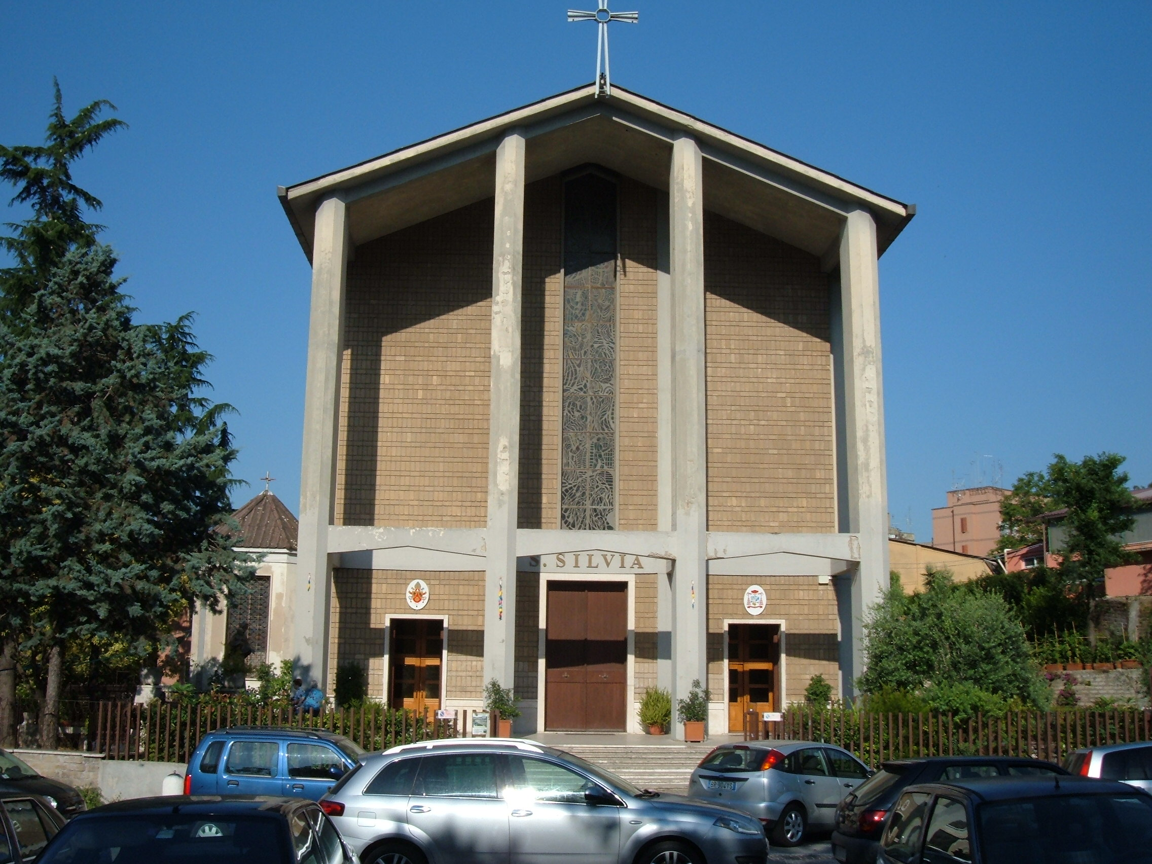 Chiesa di Santa Silvia, a Roma, nel quartiere Portuense.